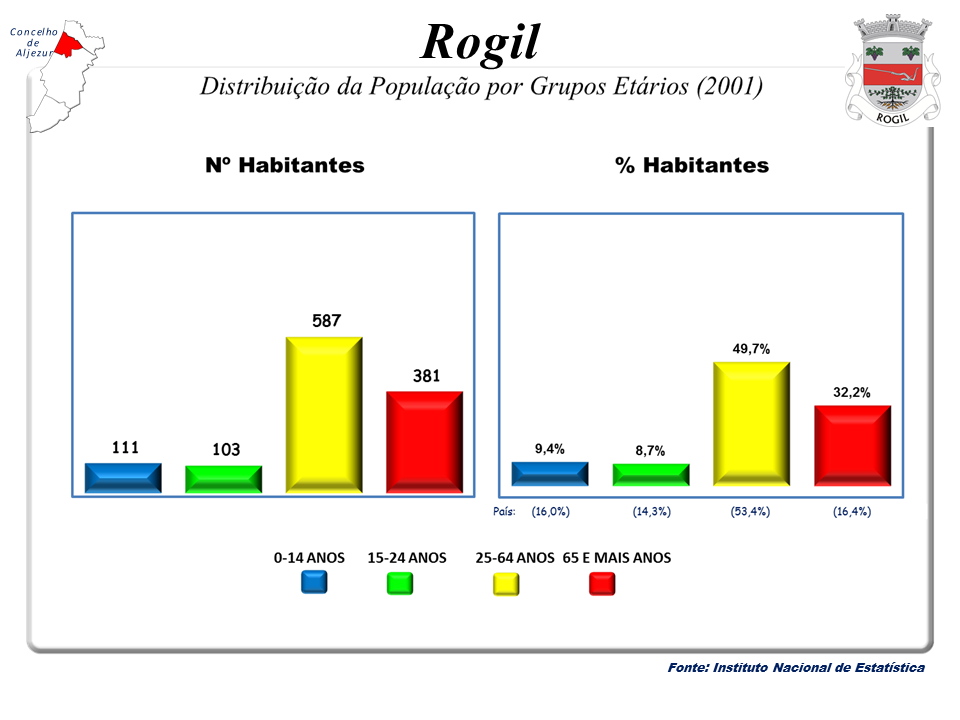 Censos 1864/2011